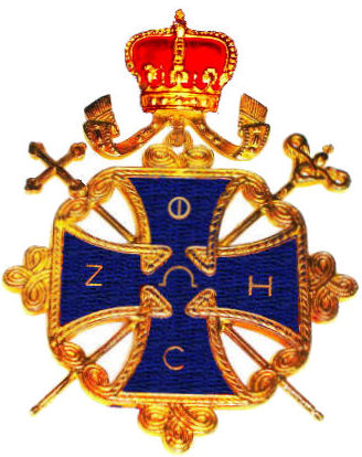 La Santa Croce di Gerusalemme, simbolo dell'Ordine Patriarcale.